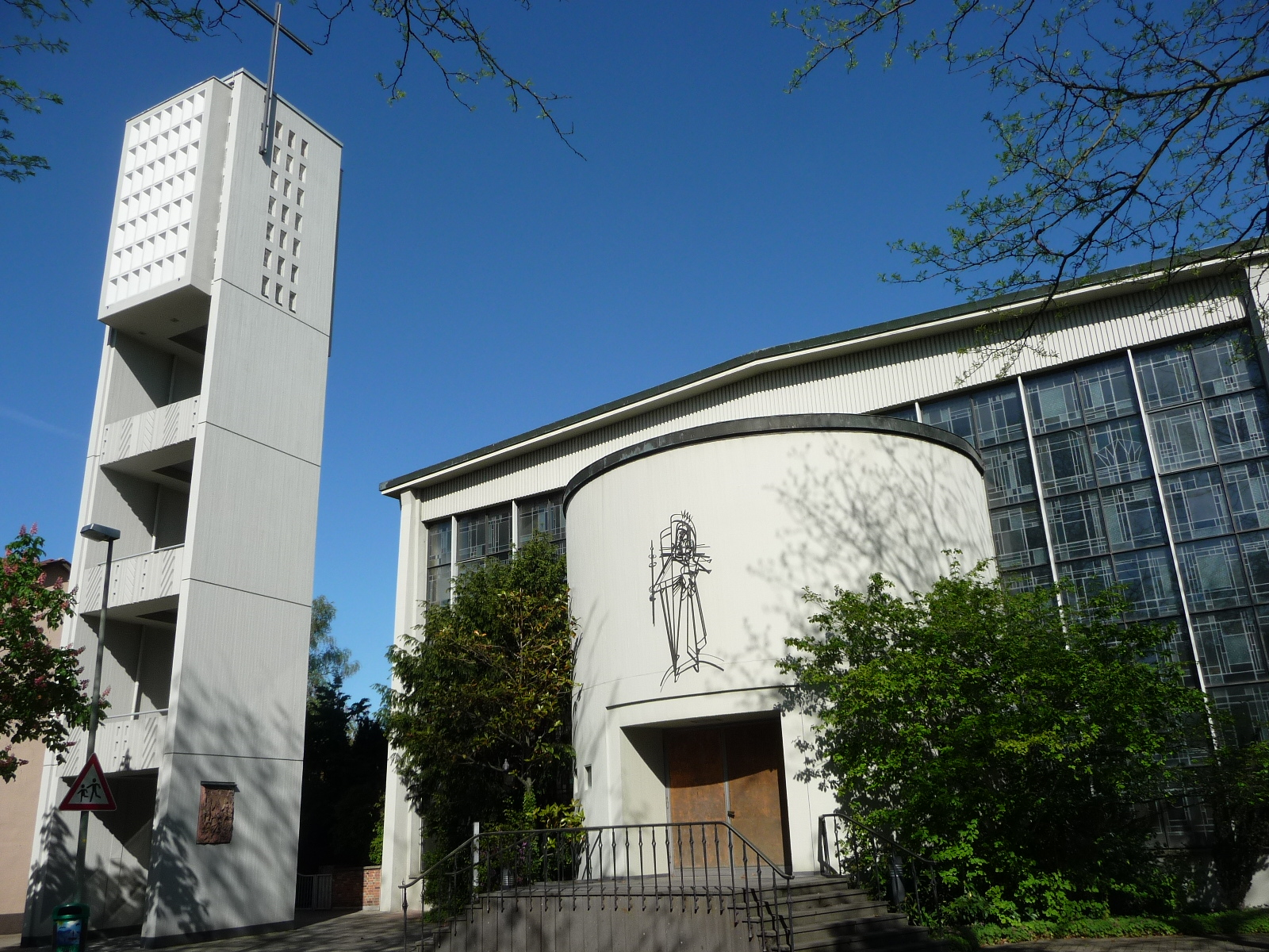 Maria Königin (Ludwigshafen-Edigheim)